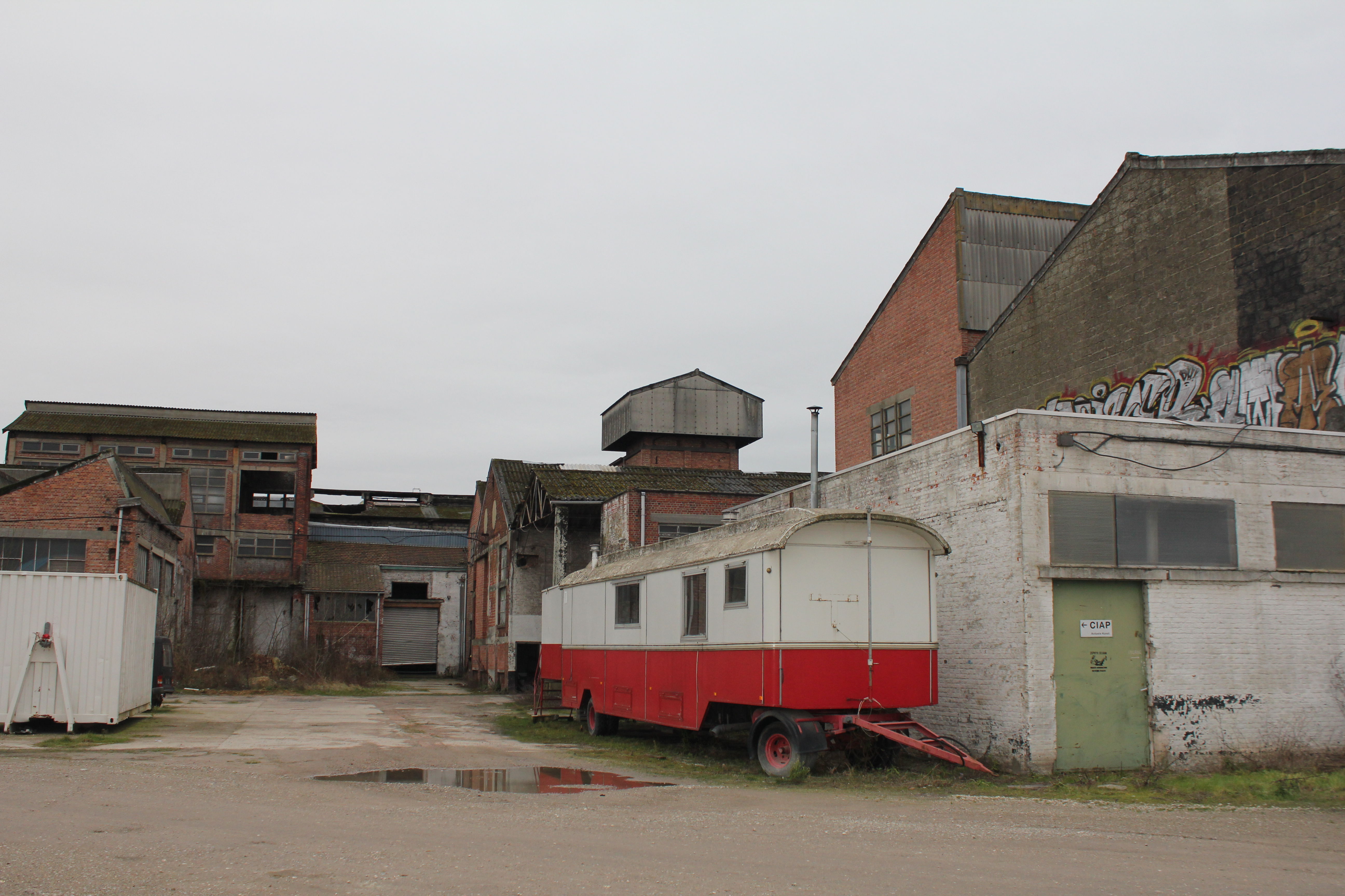 Gelatinefabriek aan de Armand Hertzstraat in Hasselt met centraal de watertoren